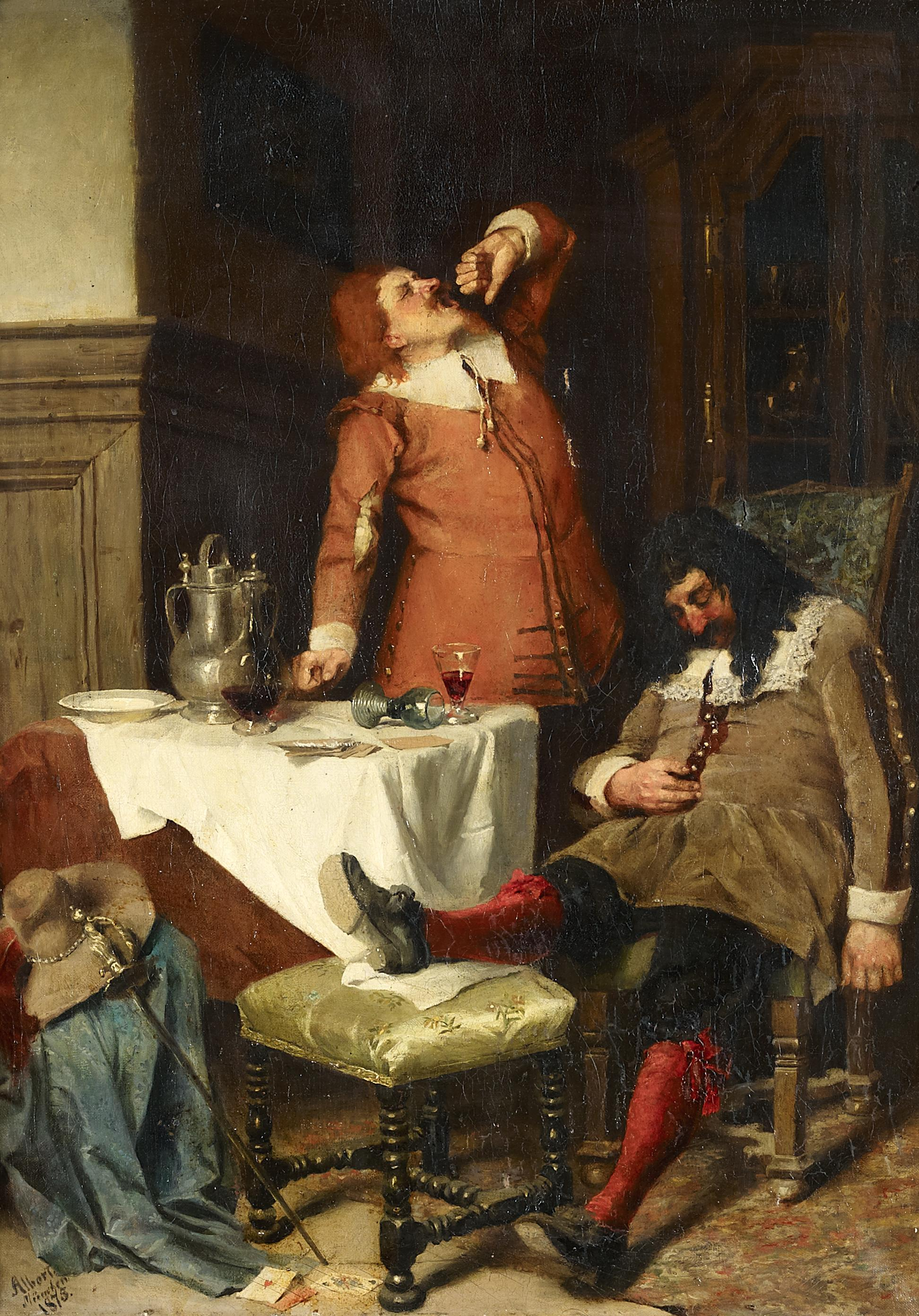 Zu später Stunde. Signiert und datiert unten links: Albert / München / 1875. Öl auf Leinwand. 88 x 64 cm